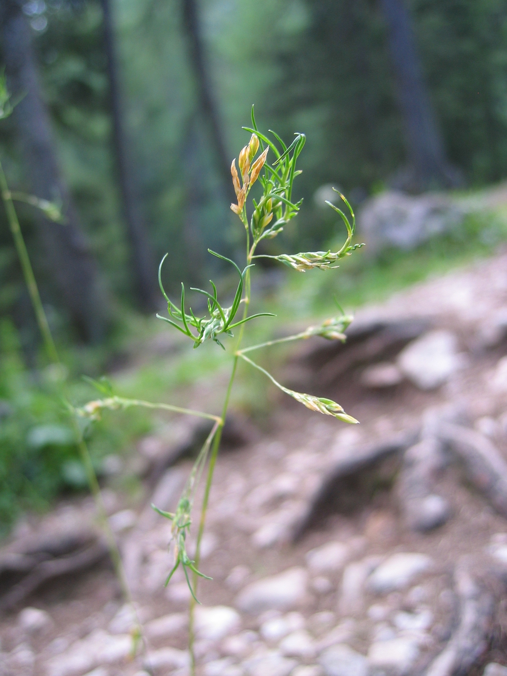 Poa alpina subsp. vivipara, Wurzeralm, ~1.400 m, Upper Austria, Austria